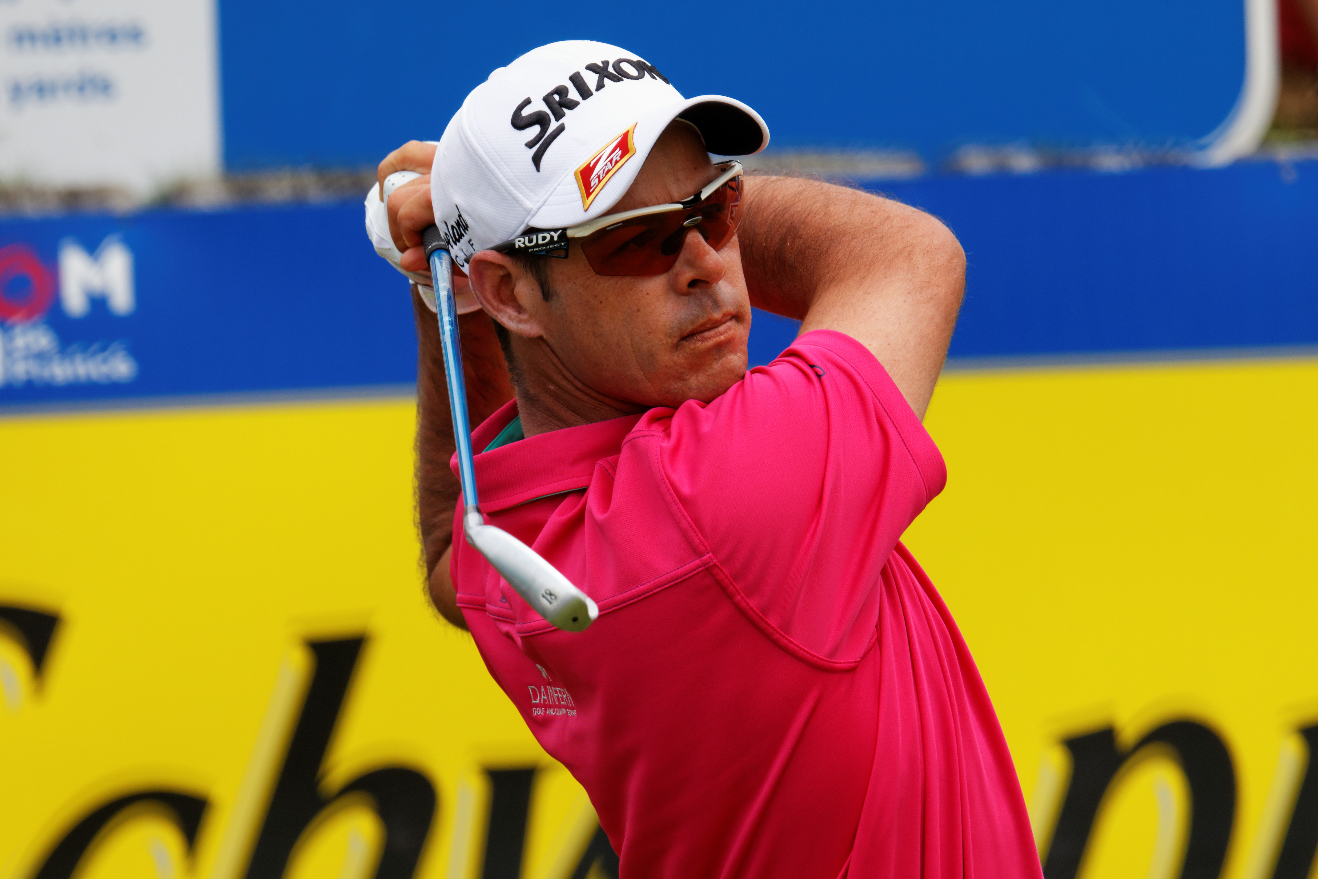 Image prise lors de l'Alstom - Open de France 2015 - Départ du tee n°1 - 4ème tour